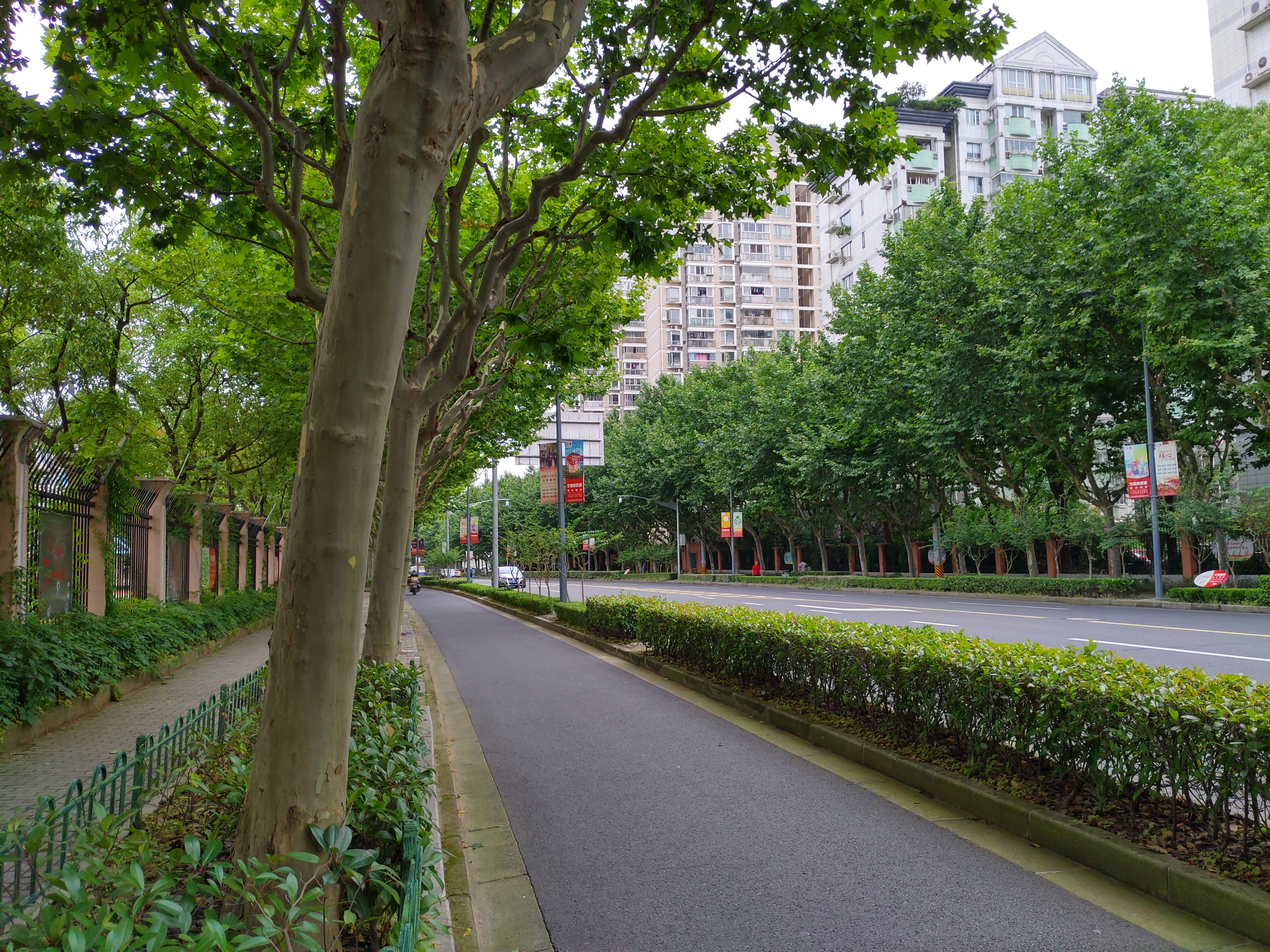 上海云台路街景 2020 7月